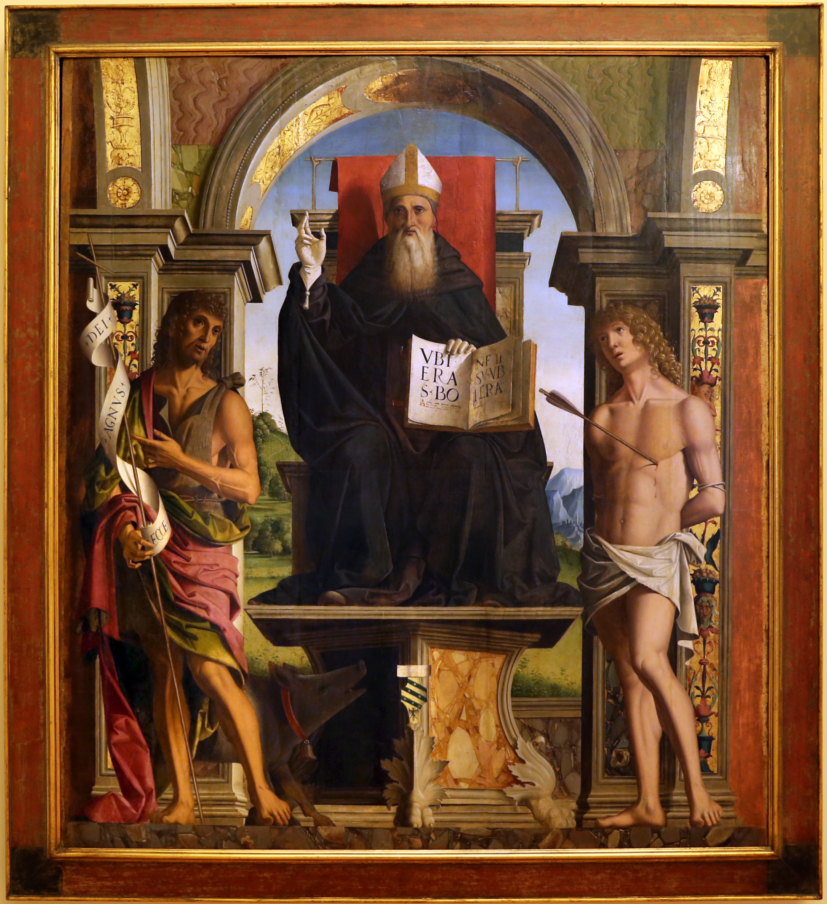 chiesa di San Giacomo Apostolo dei Domenicani This is a photo of a monument which is part of cultural heritage of Italy.